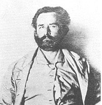 Summary Franz Wilhelm Junghuhn (1809-1864), picture taken in 1860. From Biografisch Woordenboek van het Socialisme en de Arbeidersbeweging in Nederland.